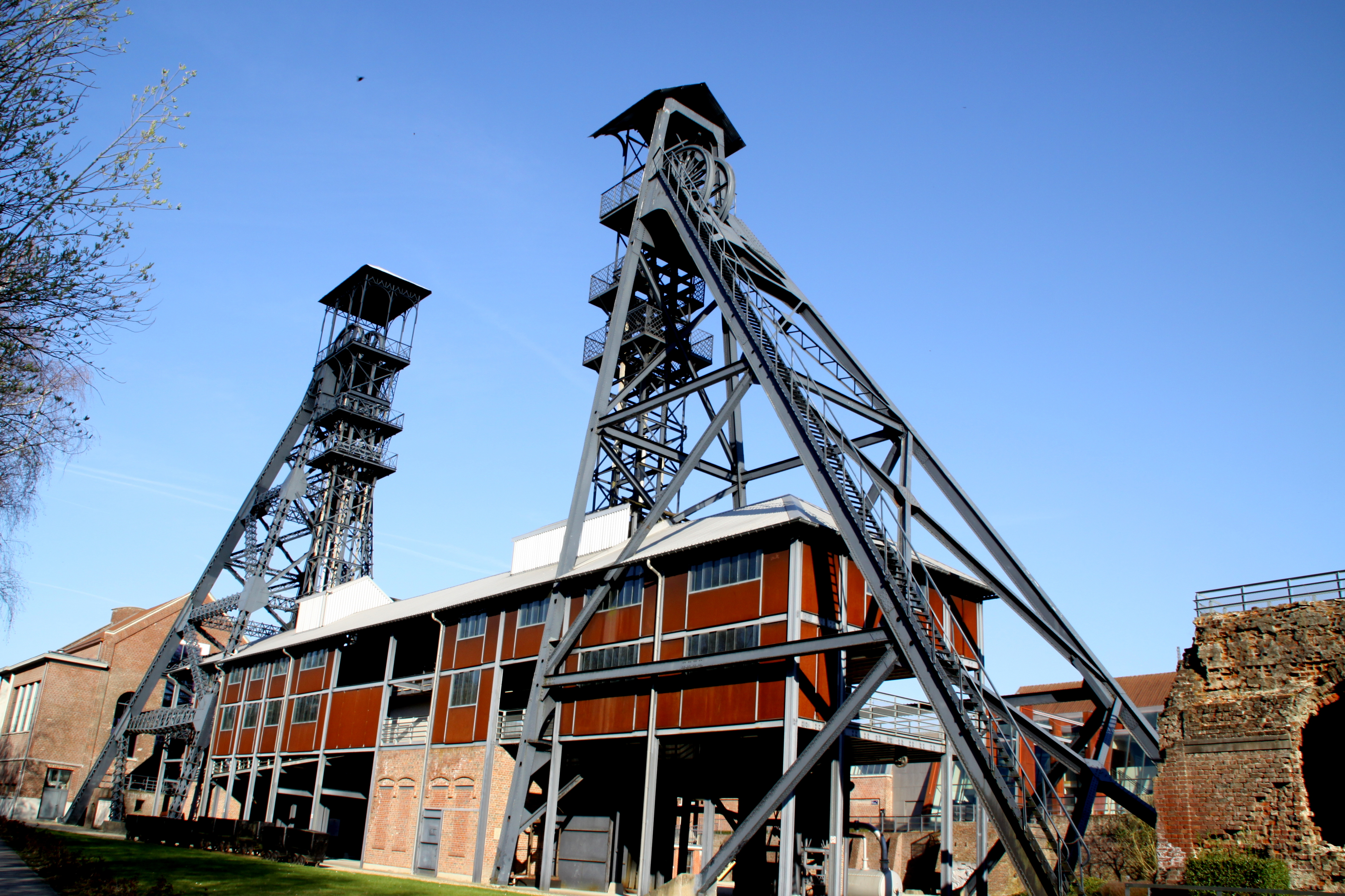 Fërdertierm vum Bois du Cazier am Mäerz 2019